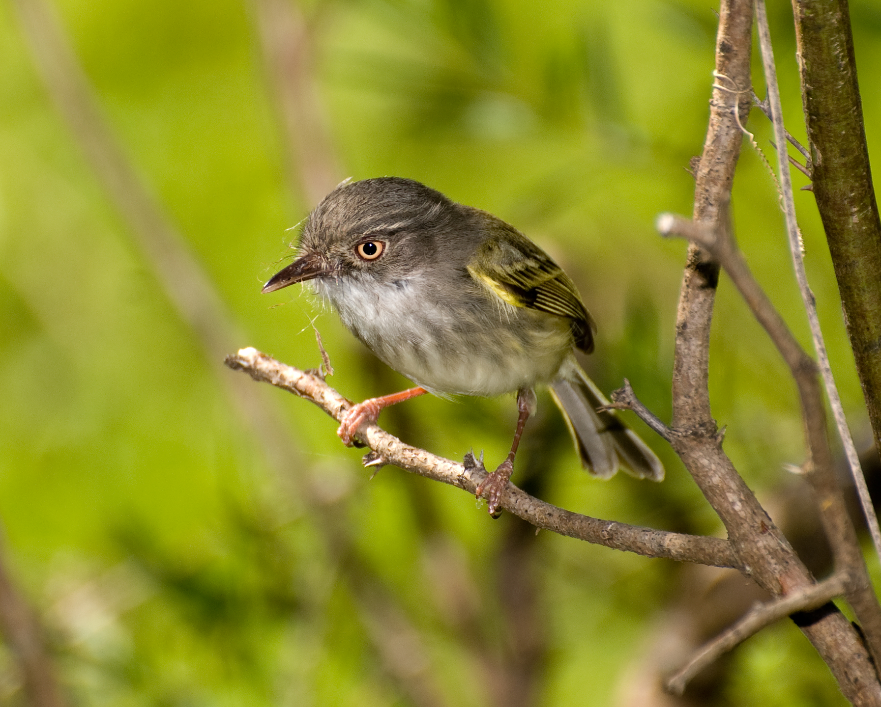 Mosqueta Ojo Dorado Hemitriccus margaritaceiventer Fotografia tomada en Rincon de Franquia Uruguay